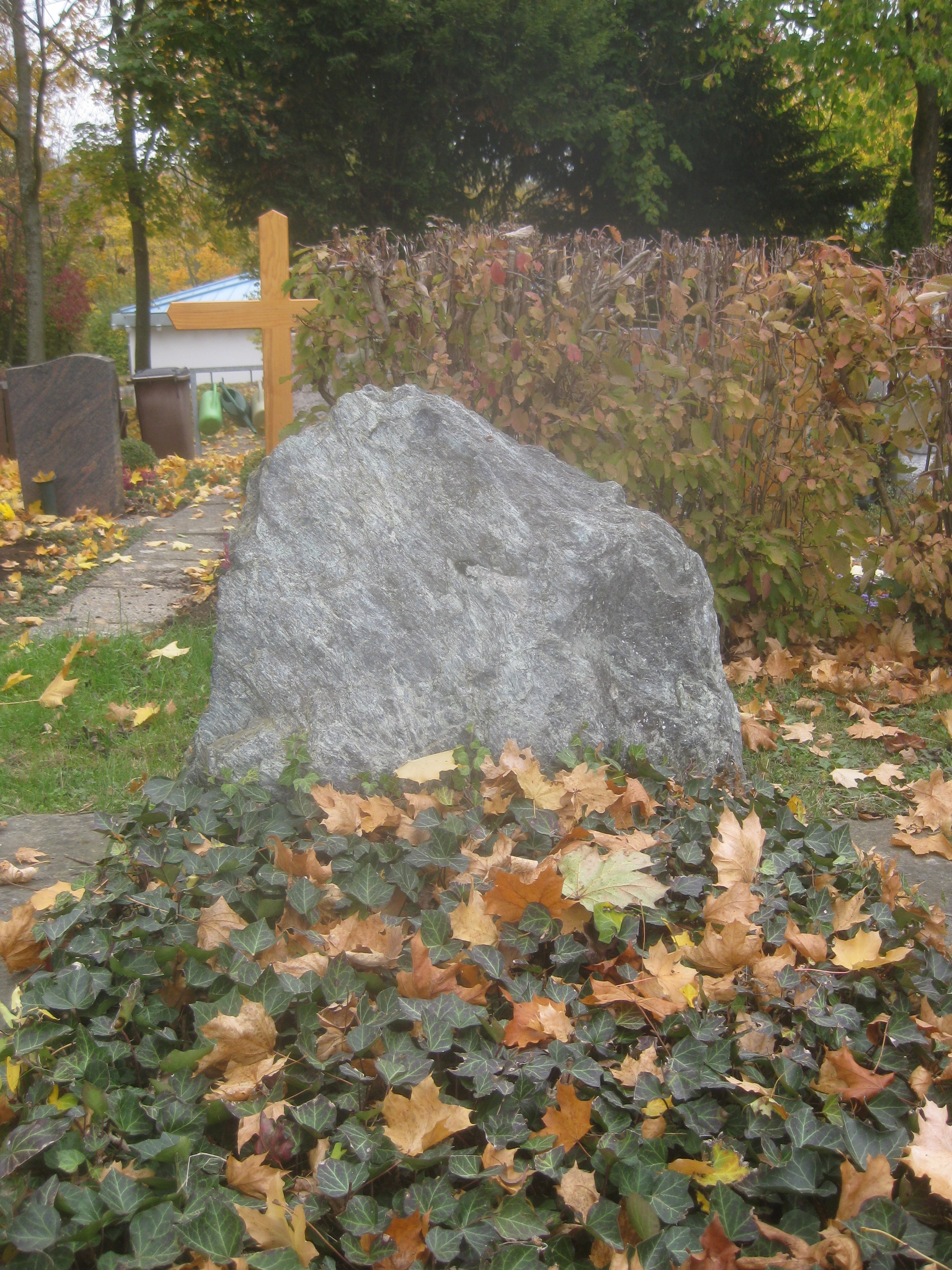 Grab von Otto Baum und seiner Frau Herta Baum (5. August 1897 – 11. Dezember 1985), Esslingen am Neckar, Friedhof Sulzgries, Sulzgrieser Straße 115, Feld 17, Reihe 1, Grabstätte 1. Der Grabstein ist ein Naturstein ohne Inschrift. Das Grab ist mit Efeu eingedeckt.